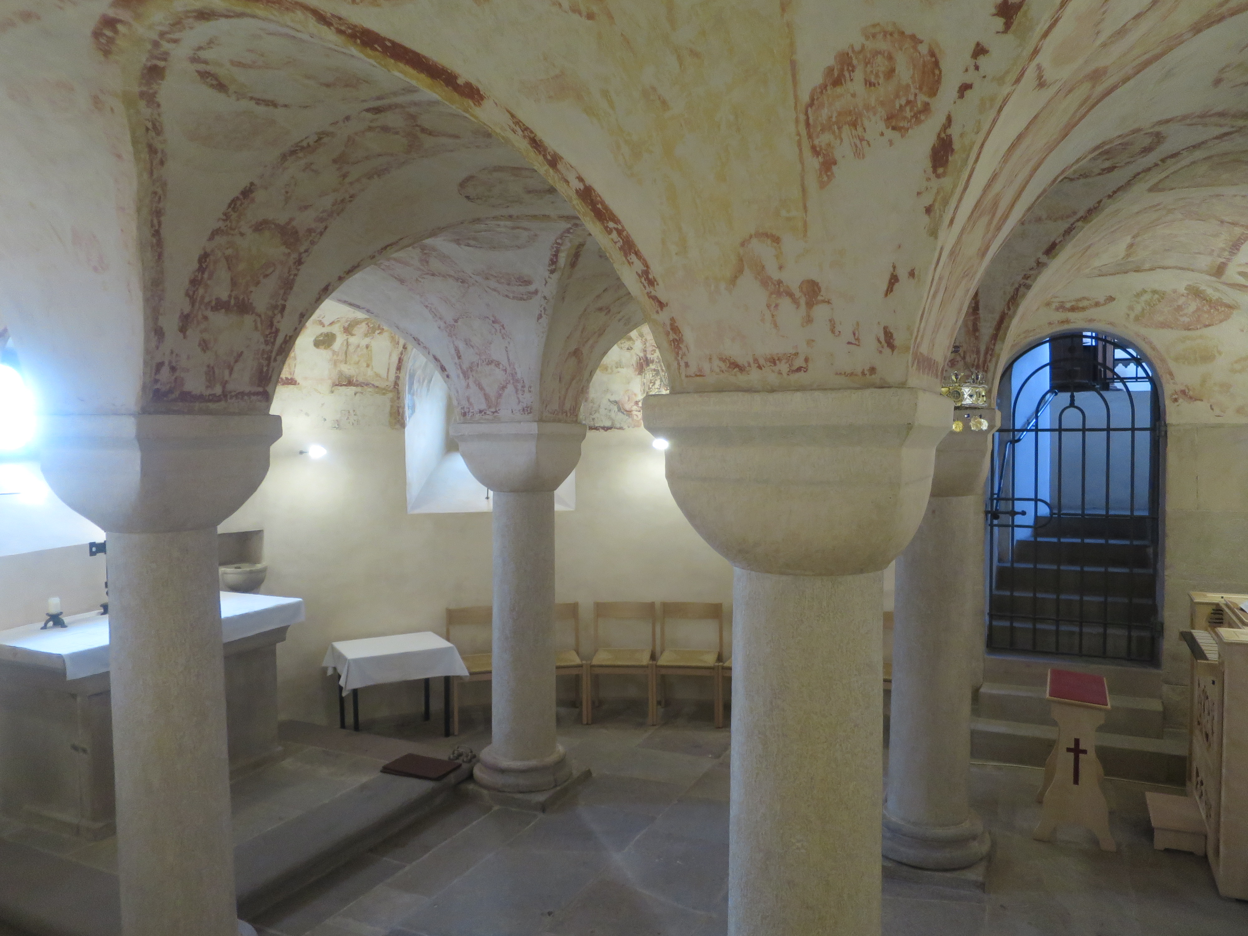 Krypta der St. Andreaskirche ( Neuenberg)/Fulda, nach der 15 Jahre andauernden Restaurierung.